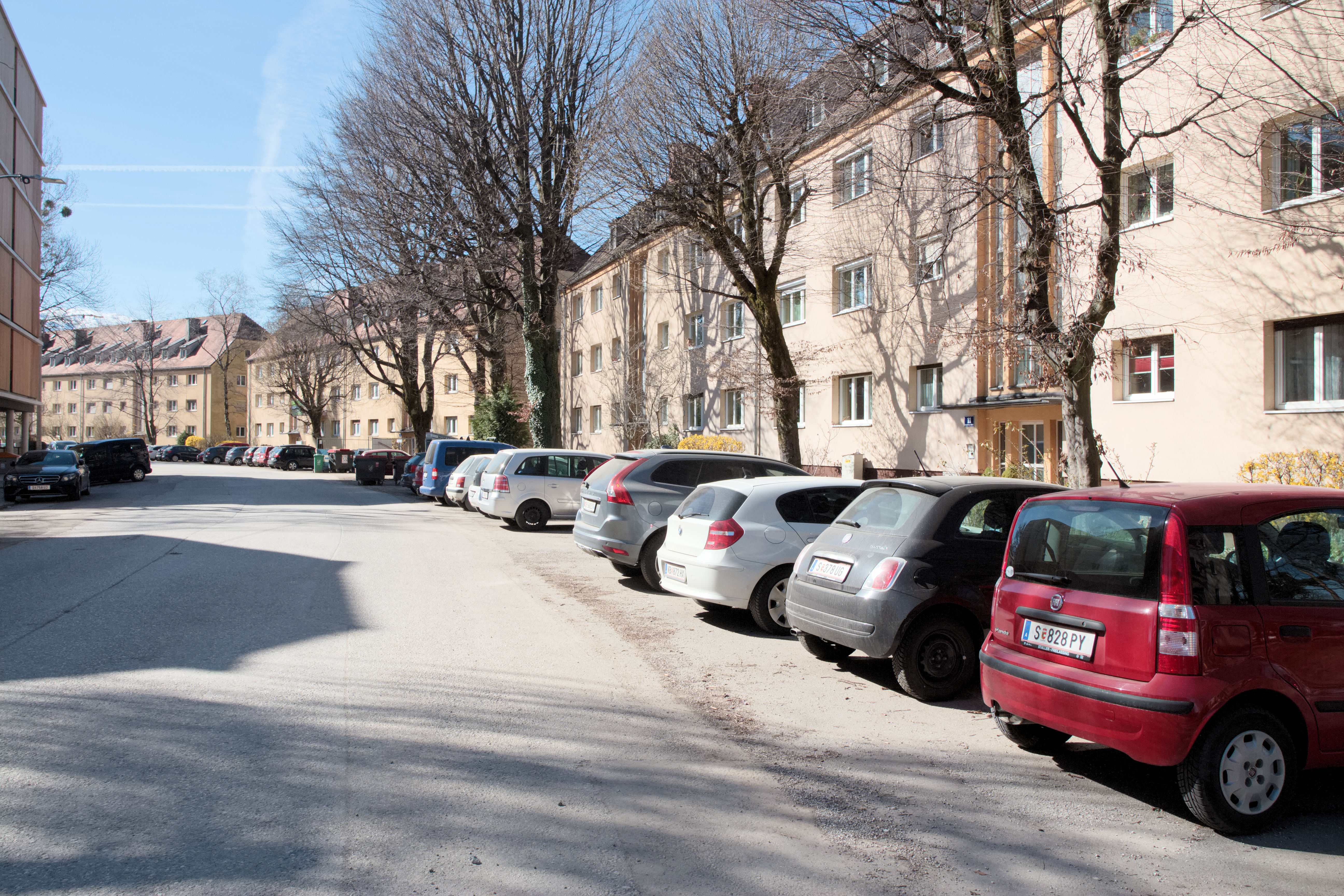 Salzburg, Stadtteil Liefering: Ein Detail der Wohnhaussieldung General-Keyes-Straße; ungerade Hausnummern 1 bis 11